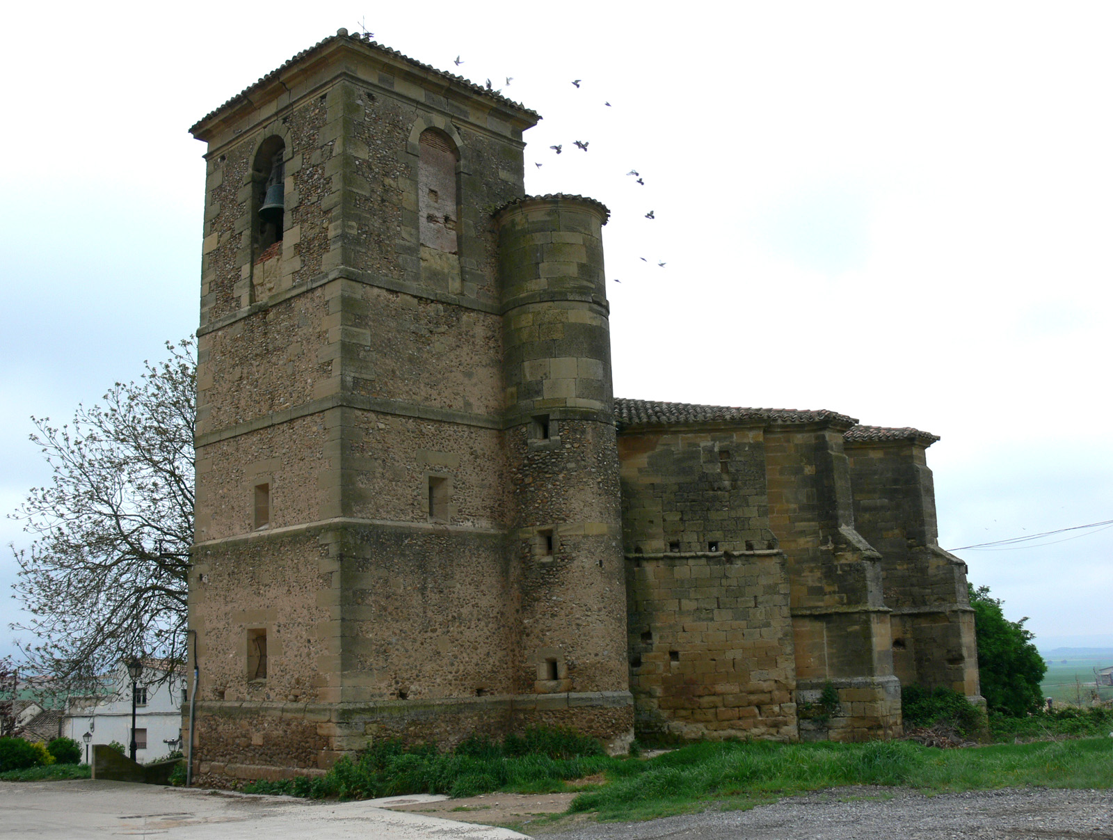 Iglesia de la Asunción en Hervías, La Rioja - España.